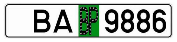 Временный автомобильный номер Белоруссии для новых машин, введены в 2016 году.